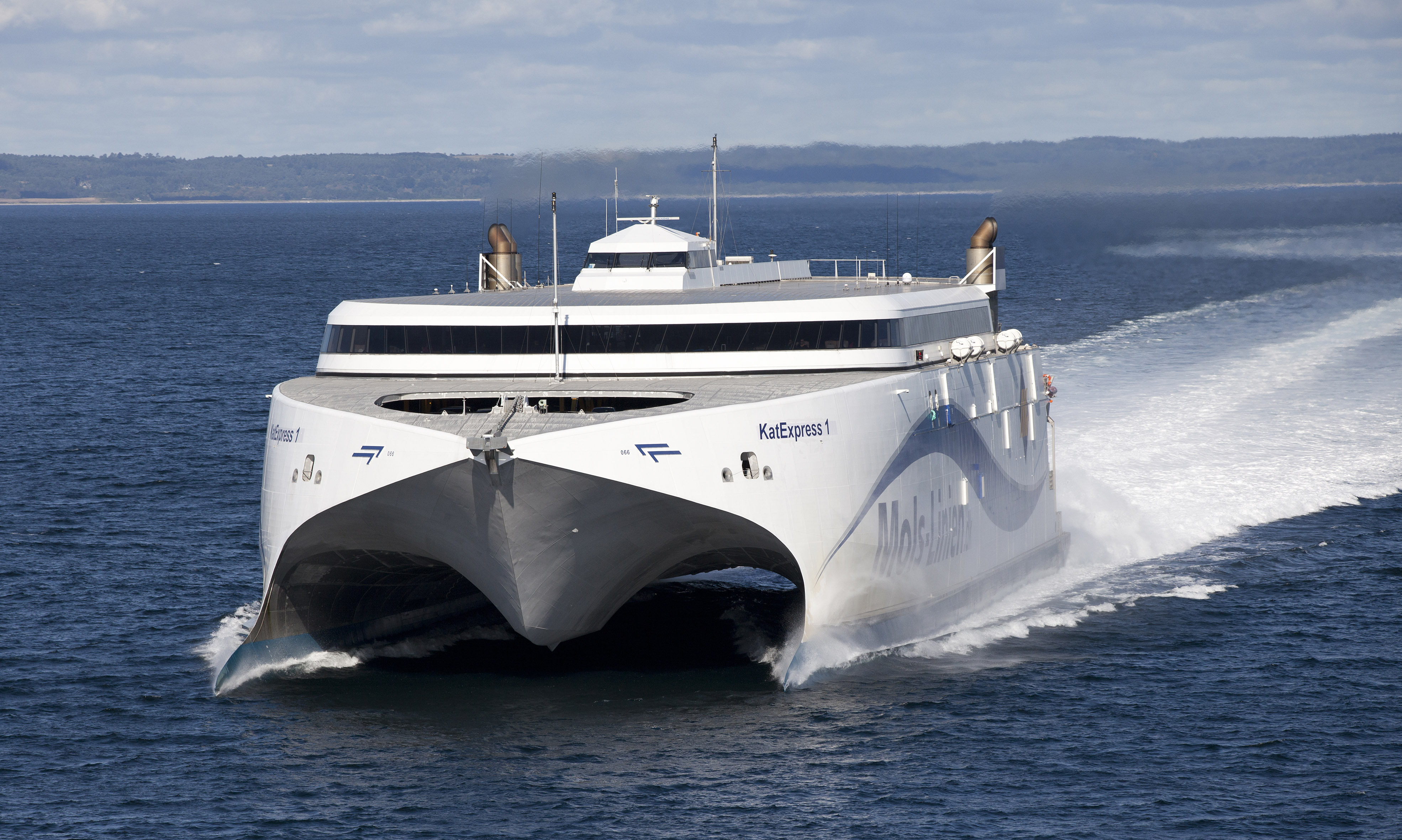 Mols-Linien Katexpress